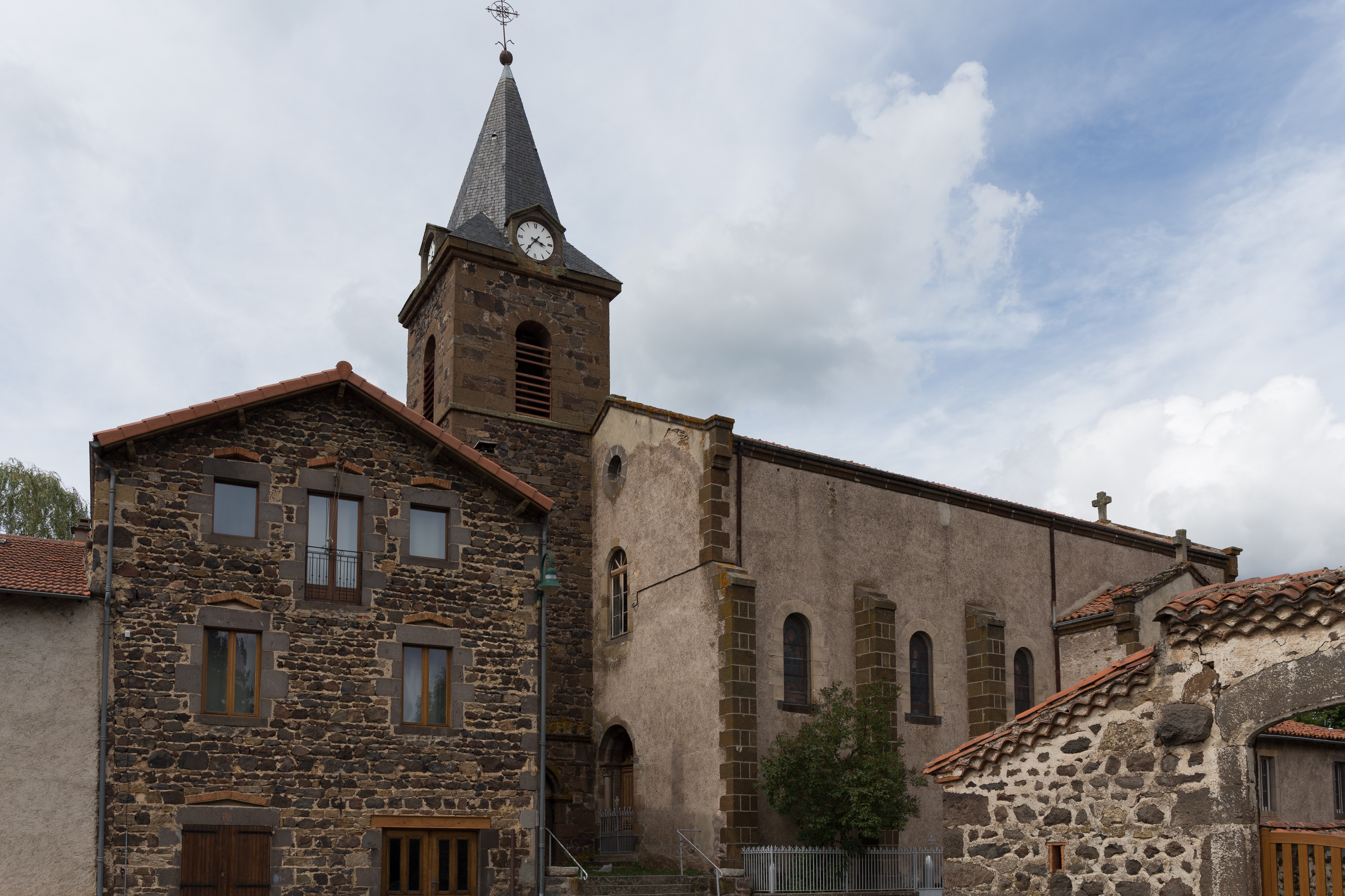 Église de Sainte-Eugénie-de-Villeneuve.